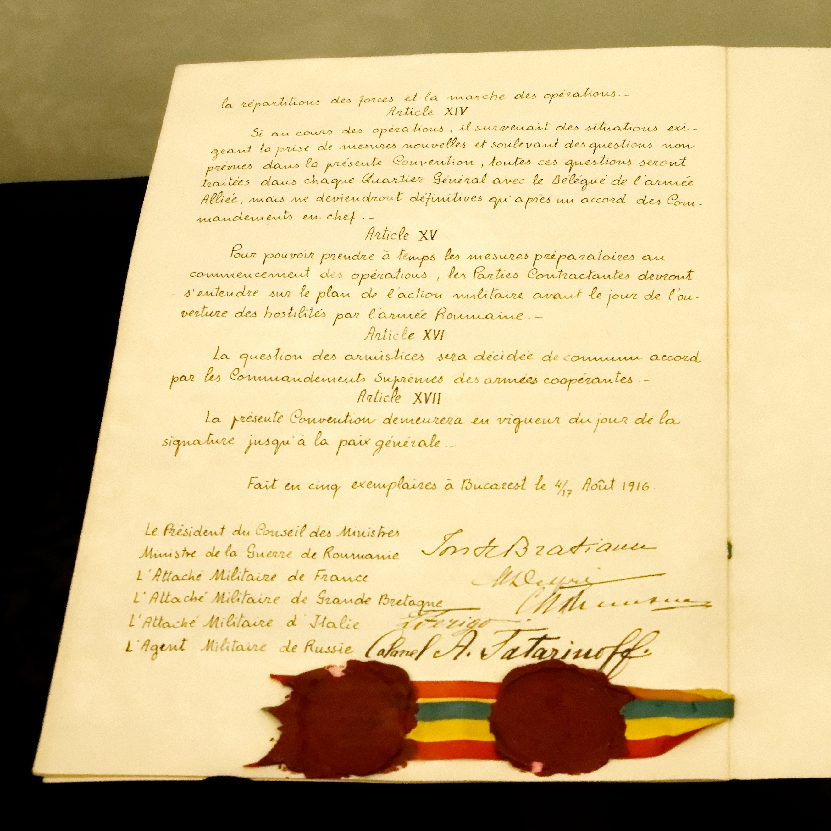 Convention militaire entre la Roumanie, la France, la Grande Bretagne, l'Italie et la Russie du 4/17 août 1916